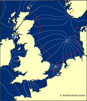 Een kaart met getijdelijnen en amfidromische punten in de Noordzee